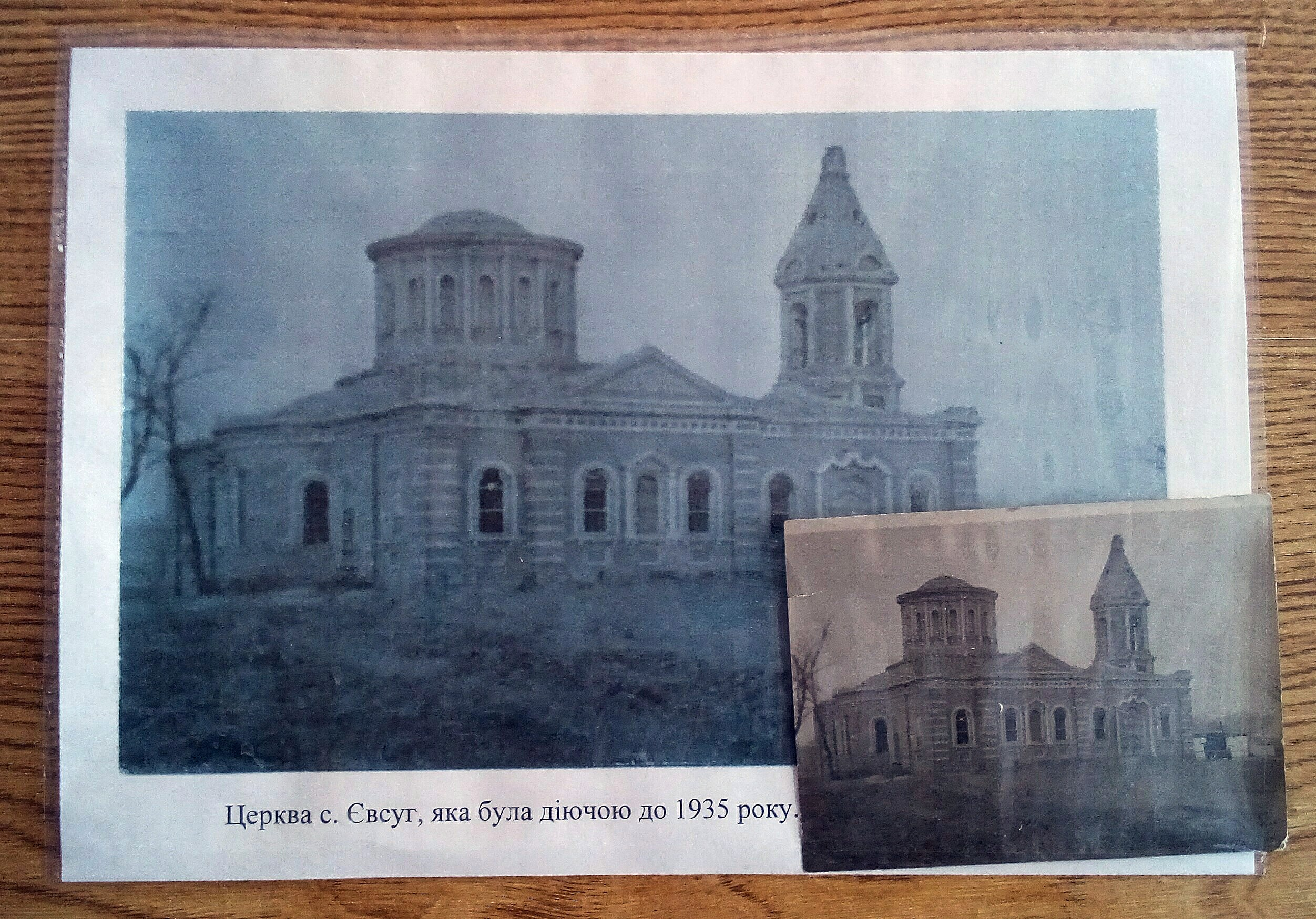 Світлина колишнього храму села Євсуг.